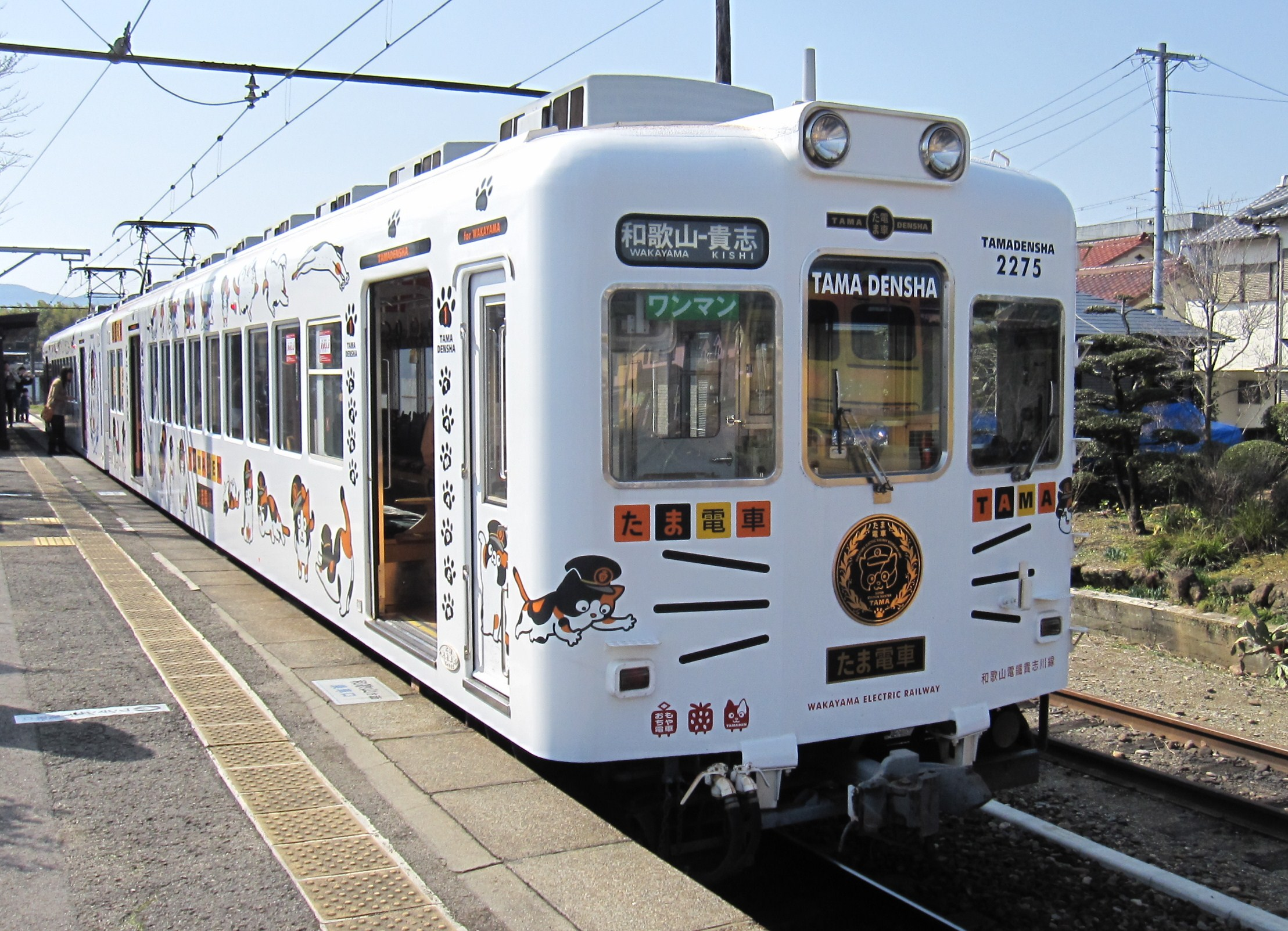 和歌山電鐵2275 たま電車 (貴志駅にて)